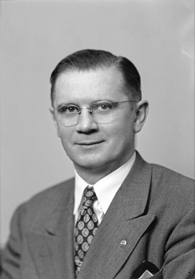 Senator Lester T. Parker, 1949